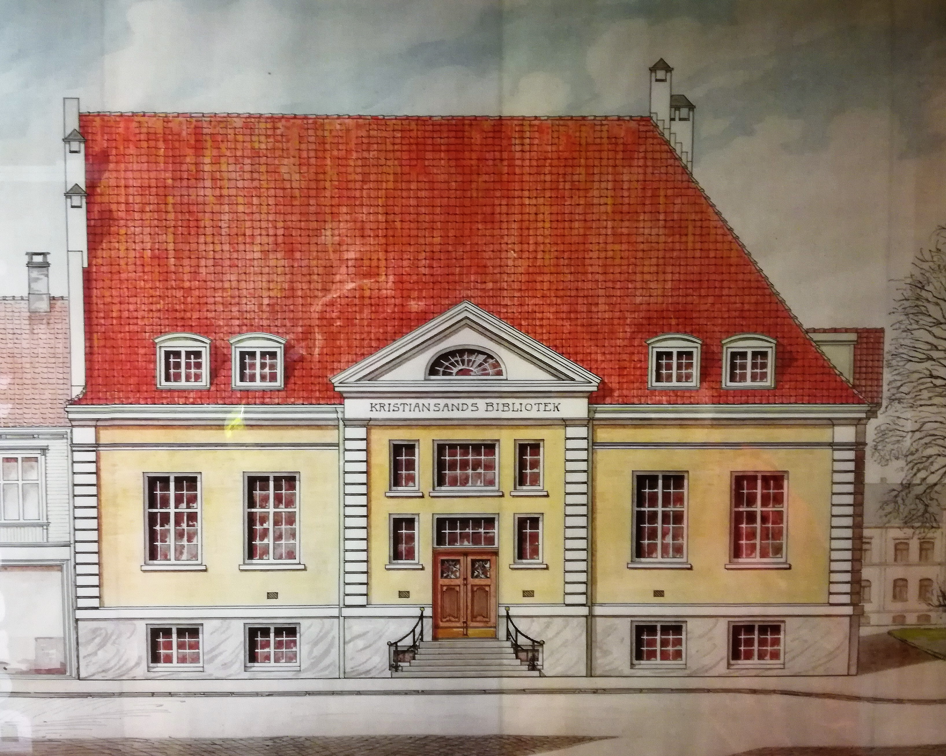 Fasadetegning av Kristiansand Folkebibliotek. Utført av Johan Keyser Frölich i ca 1914